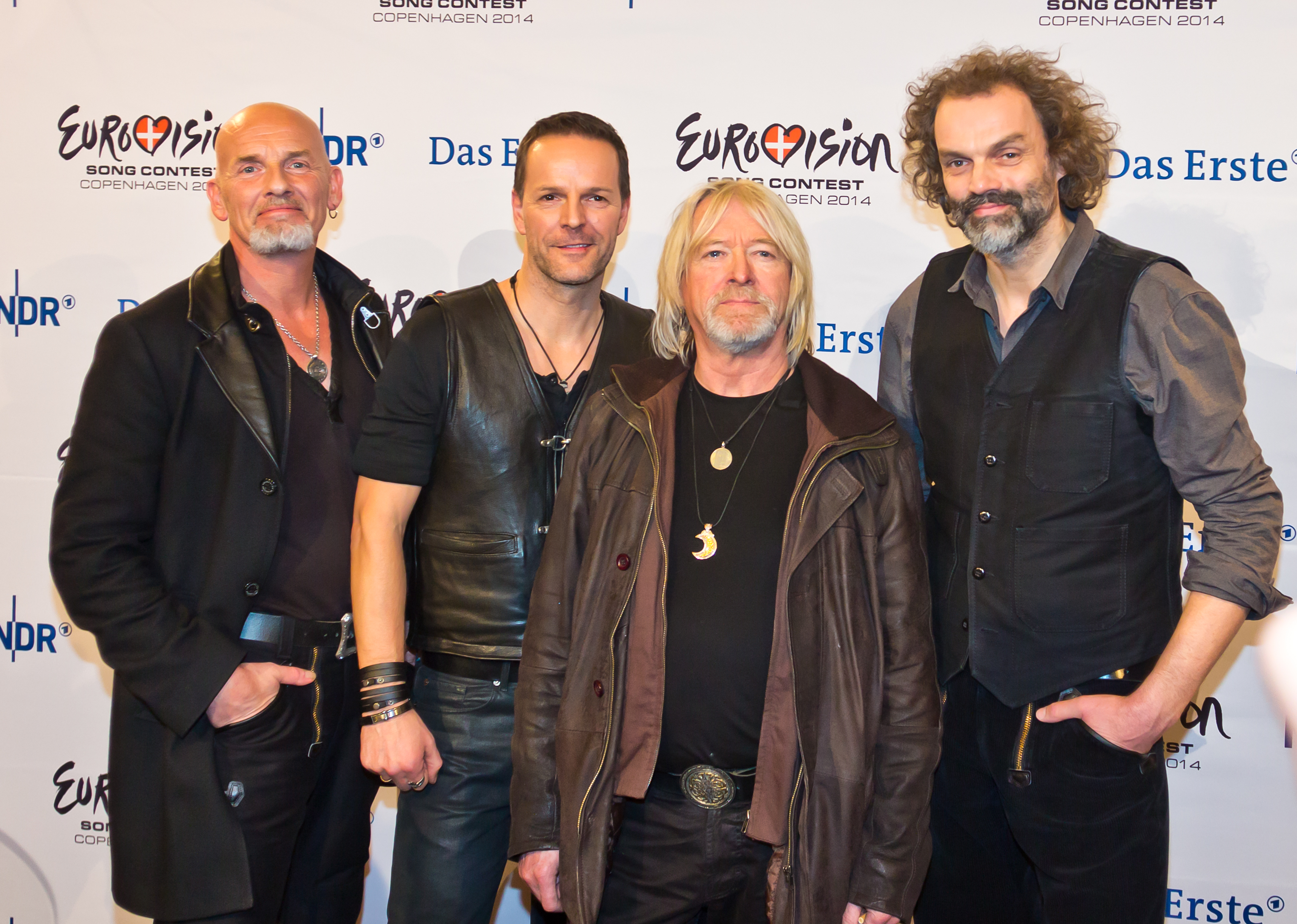 Pressekonferenz am 2. Probentrag von "Unser Song für Dänemark" mit allen 8 Acts Foto: Santiano